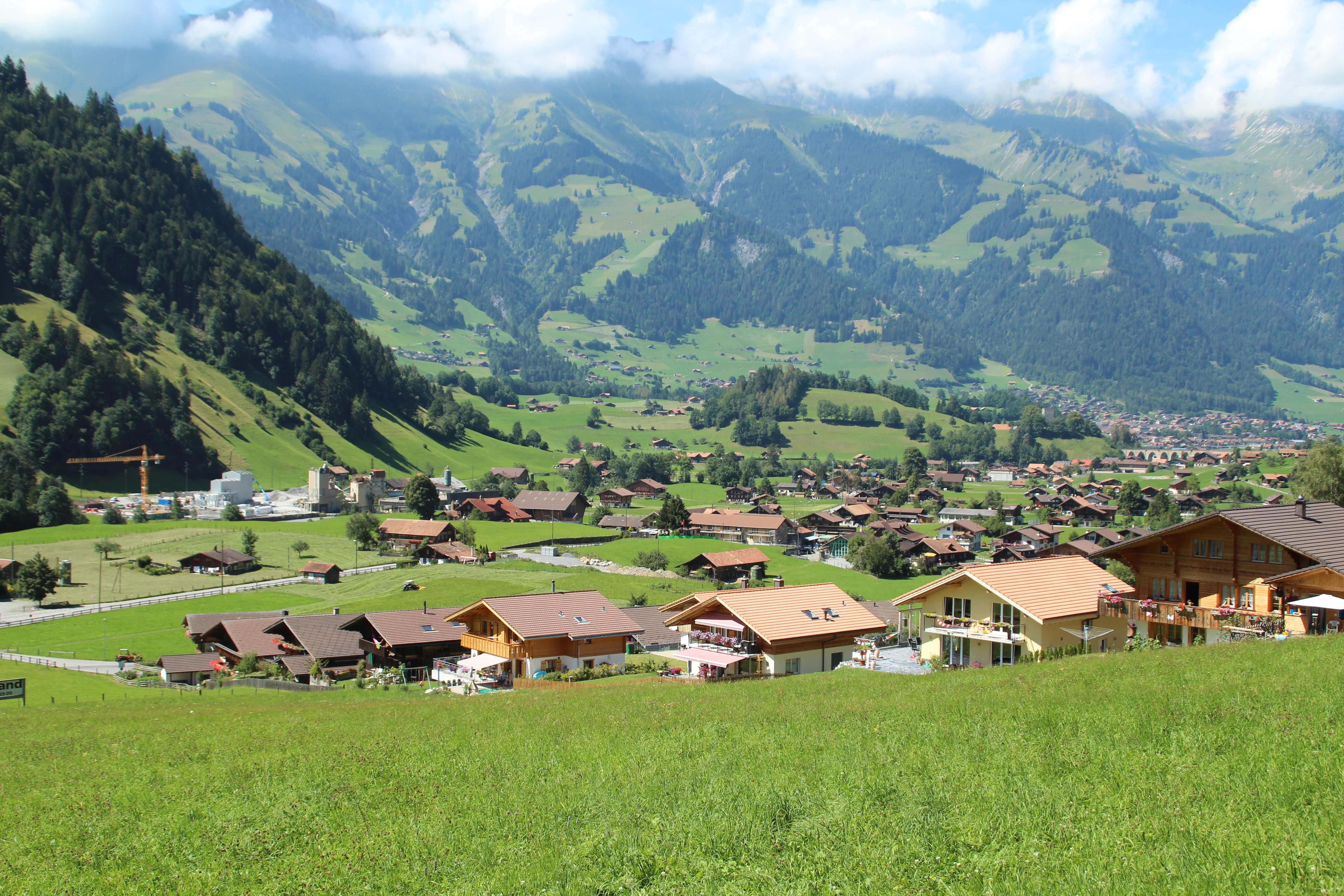 Kandergrund